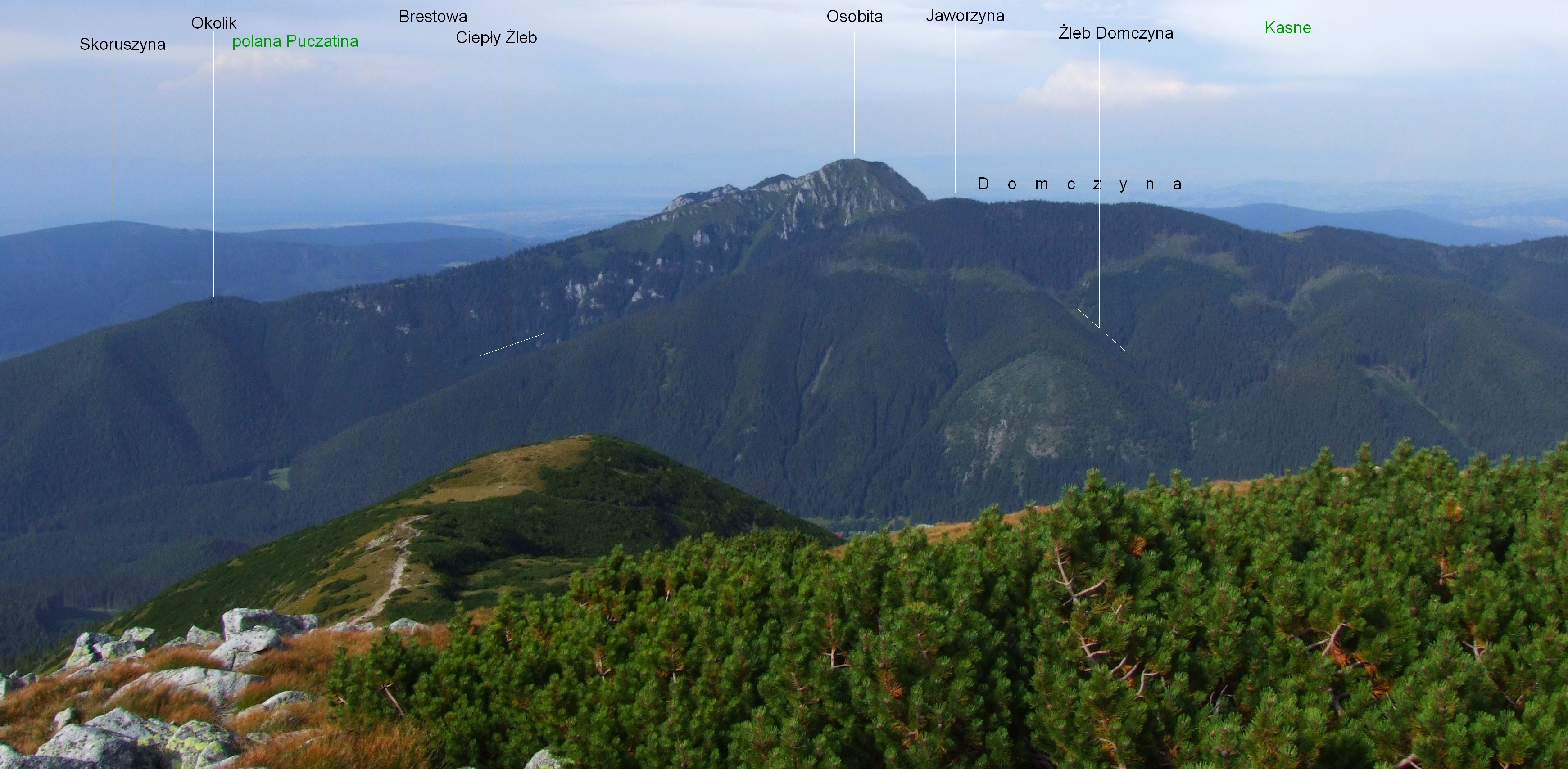 Widok z Brestowej